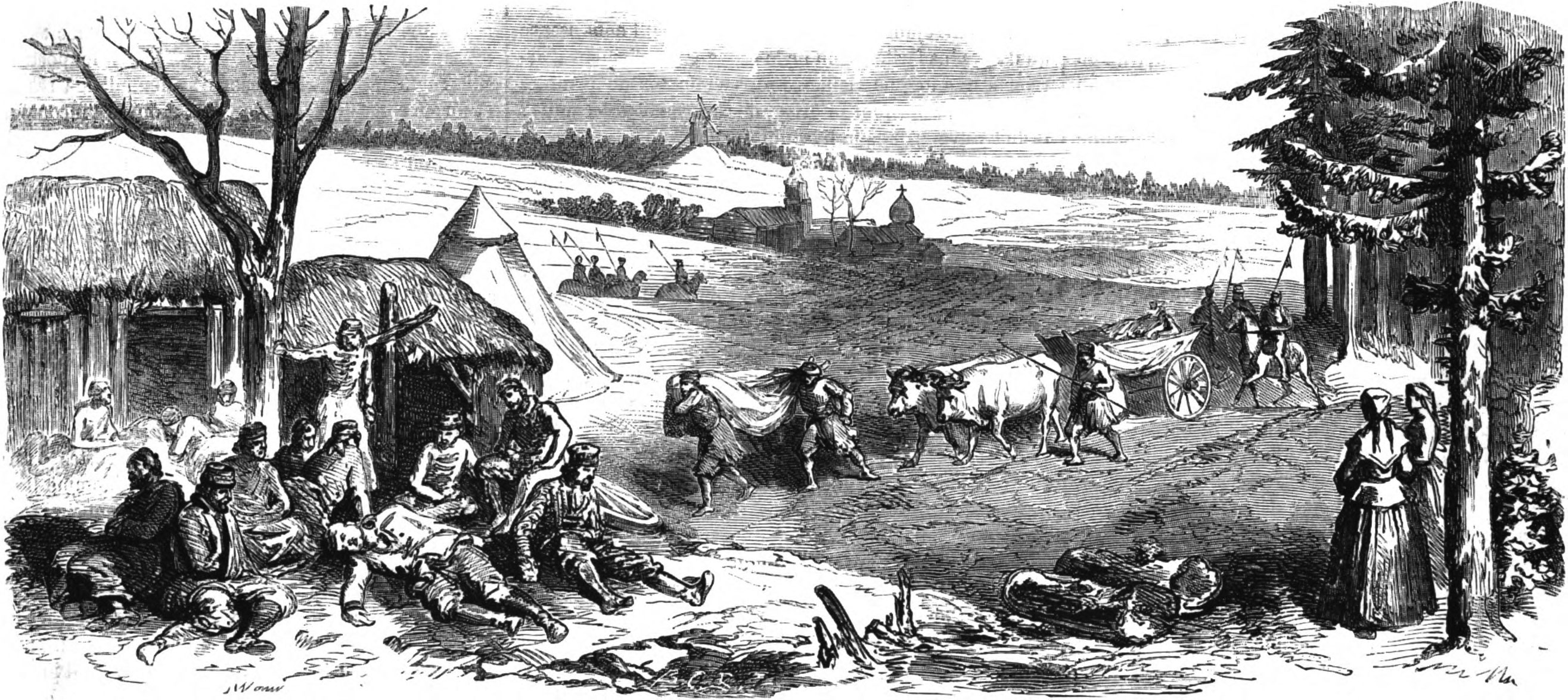 Паўстанцы пад Мінскам Беларуская (тарашкевіца): Паўстанцы пад Менскам